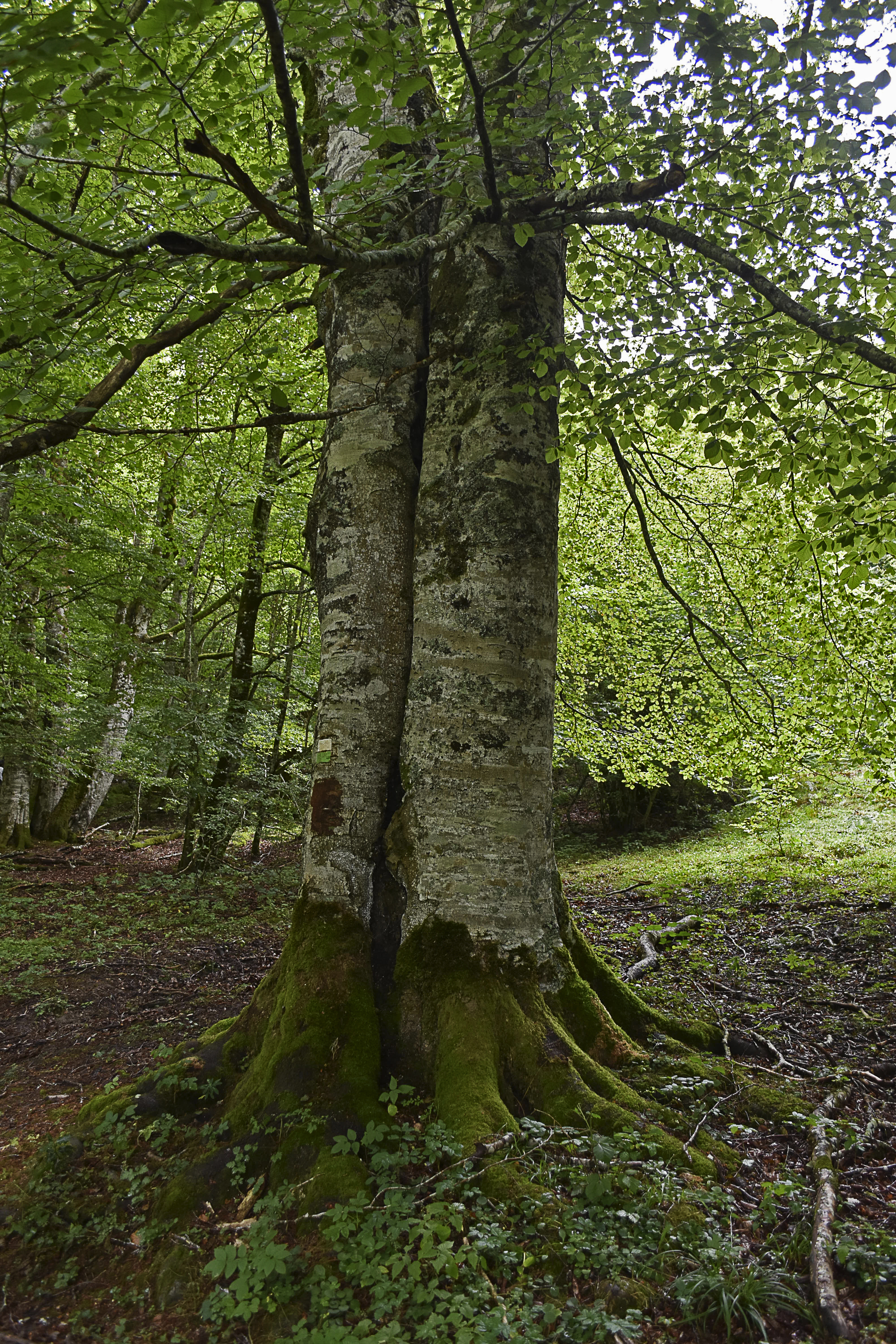 Haya en la selva de Irati, Navarra (España)